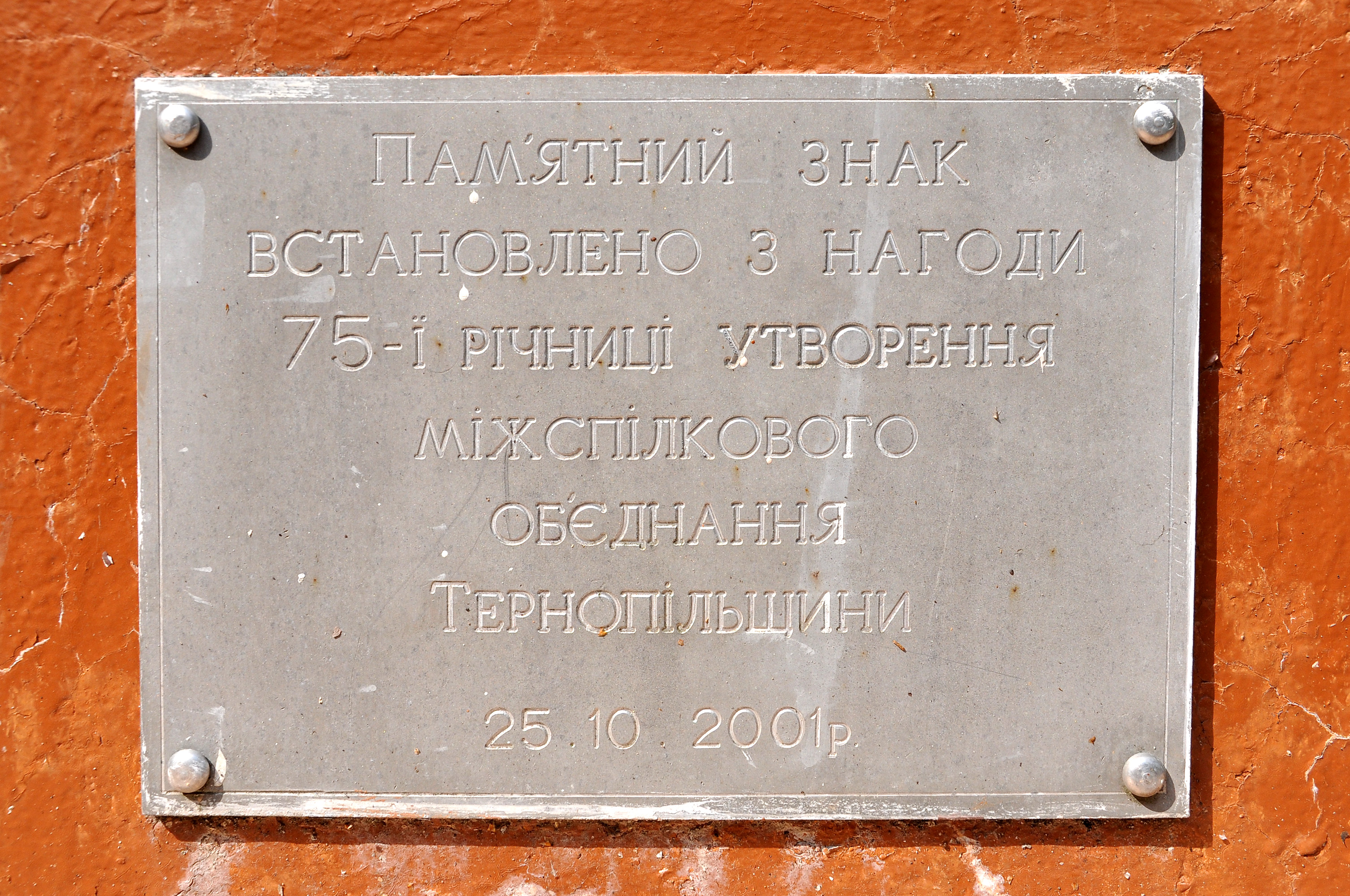 Інформаційна таблиця скульптури Ангела-хоронителя на вул. Танцорова (біля Тернопільської обласної ради професійних спілок) в Тернополі.